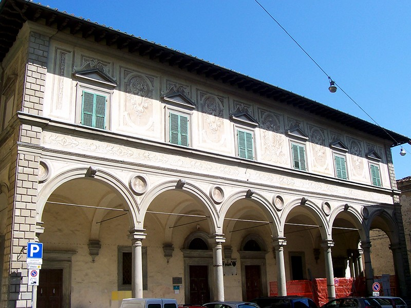 Pistoia - Biblioteca Forteguerriana